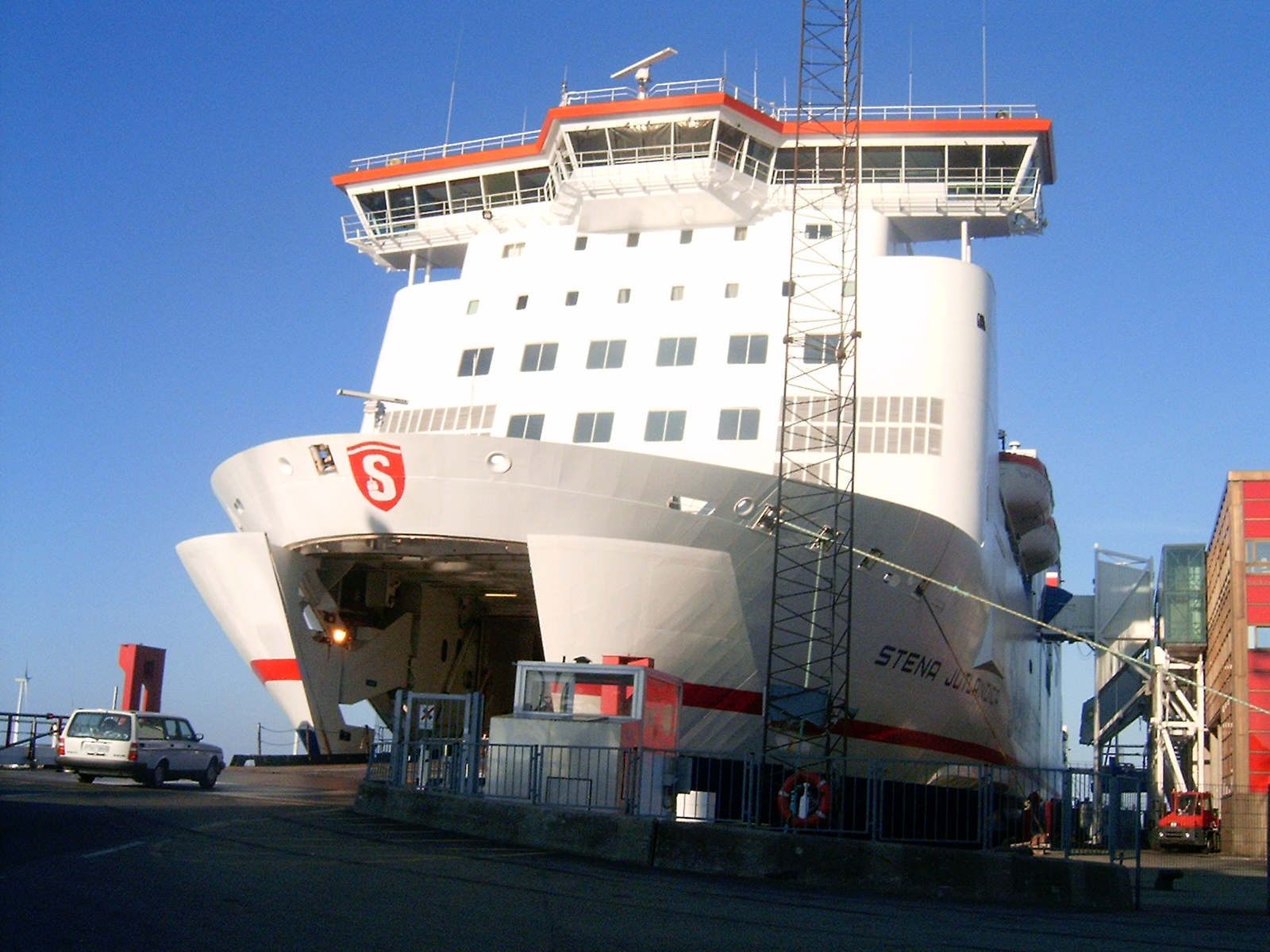 Stena Jutlandica ligger vid Frederikshamn